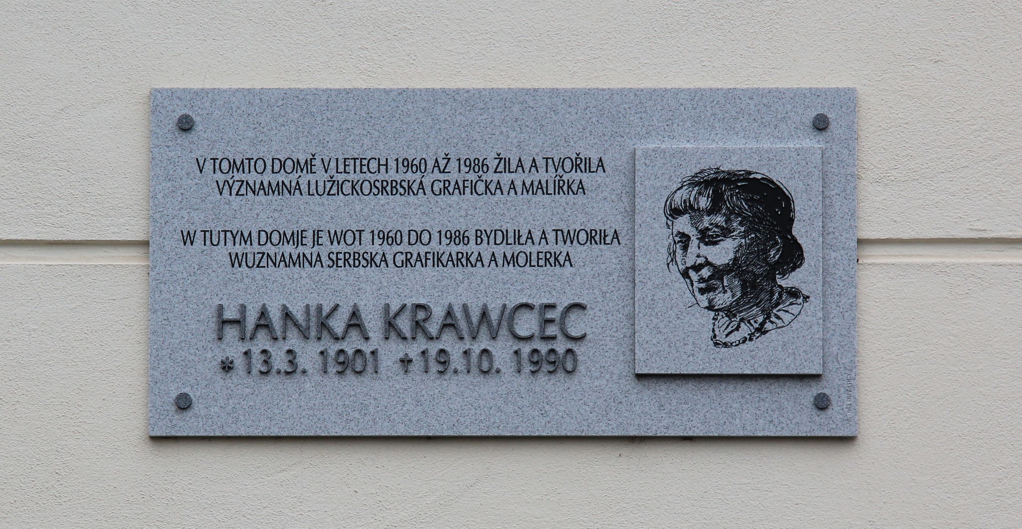 Pamětní deska věnovaná Hance Krawcec ve Varnsdorfu, okres Děčín, Česká republika. Autor: Karl Gruber (K@rl)